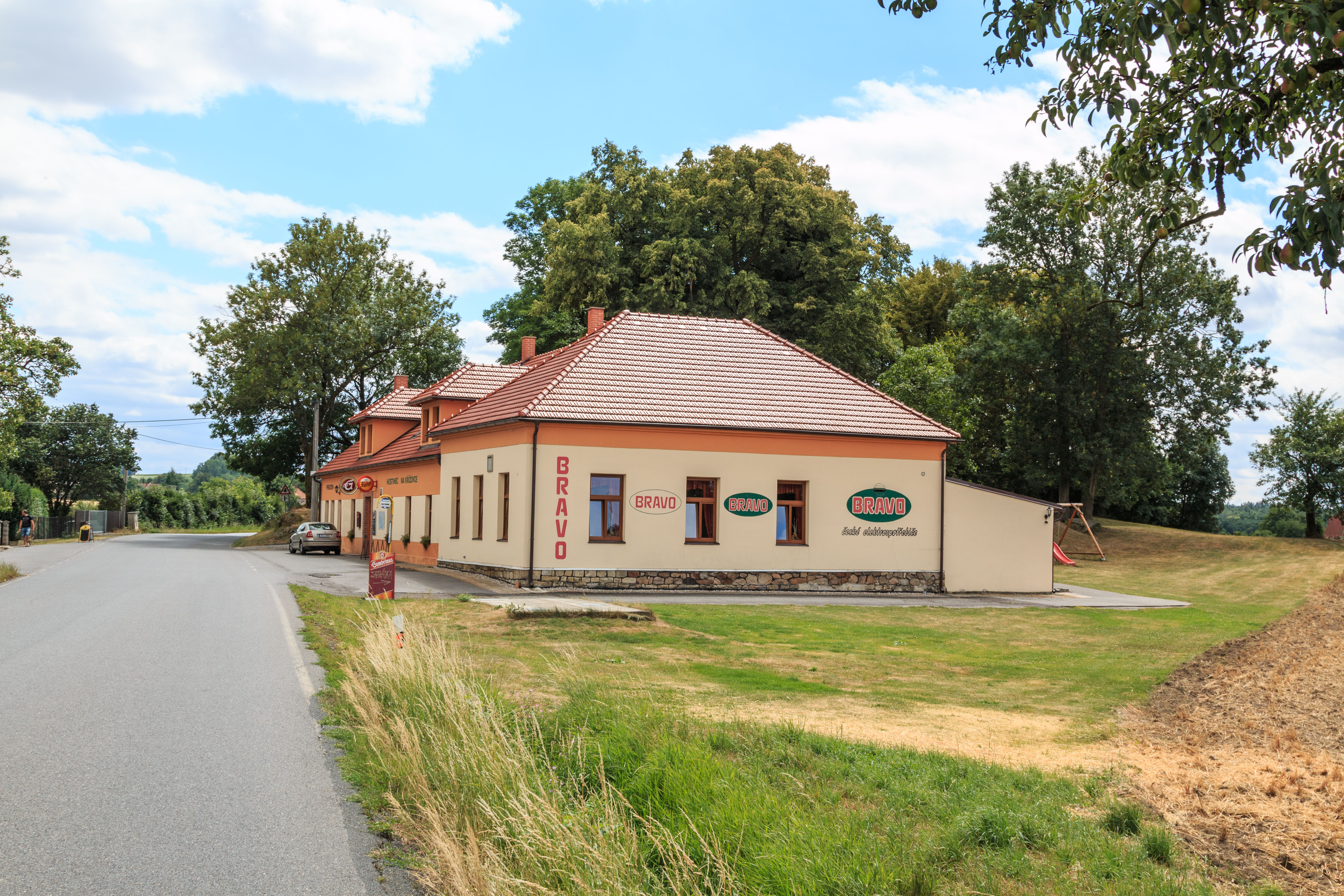 Vestec u Běstviny hostinec